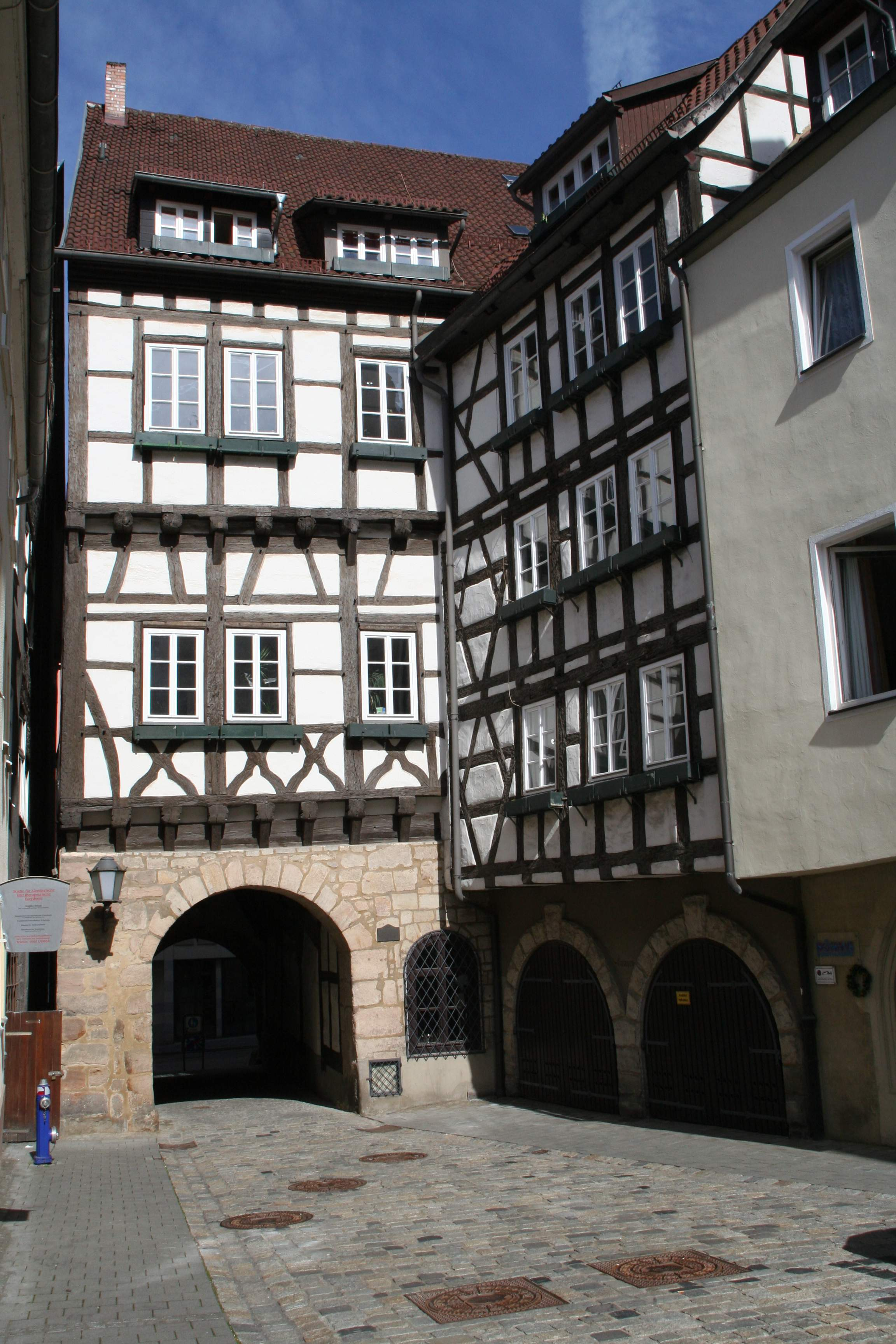 Münzmeisterhaus (Ostseite) in Ketschengasse 7, Coburg